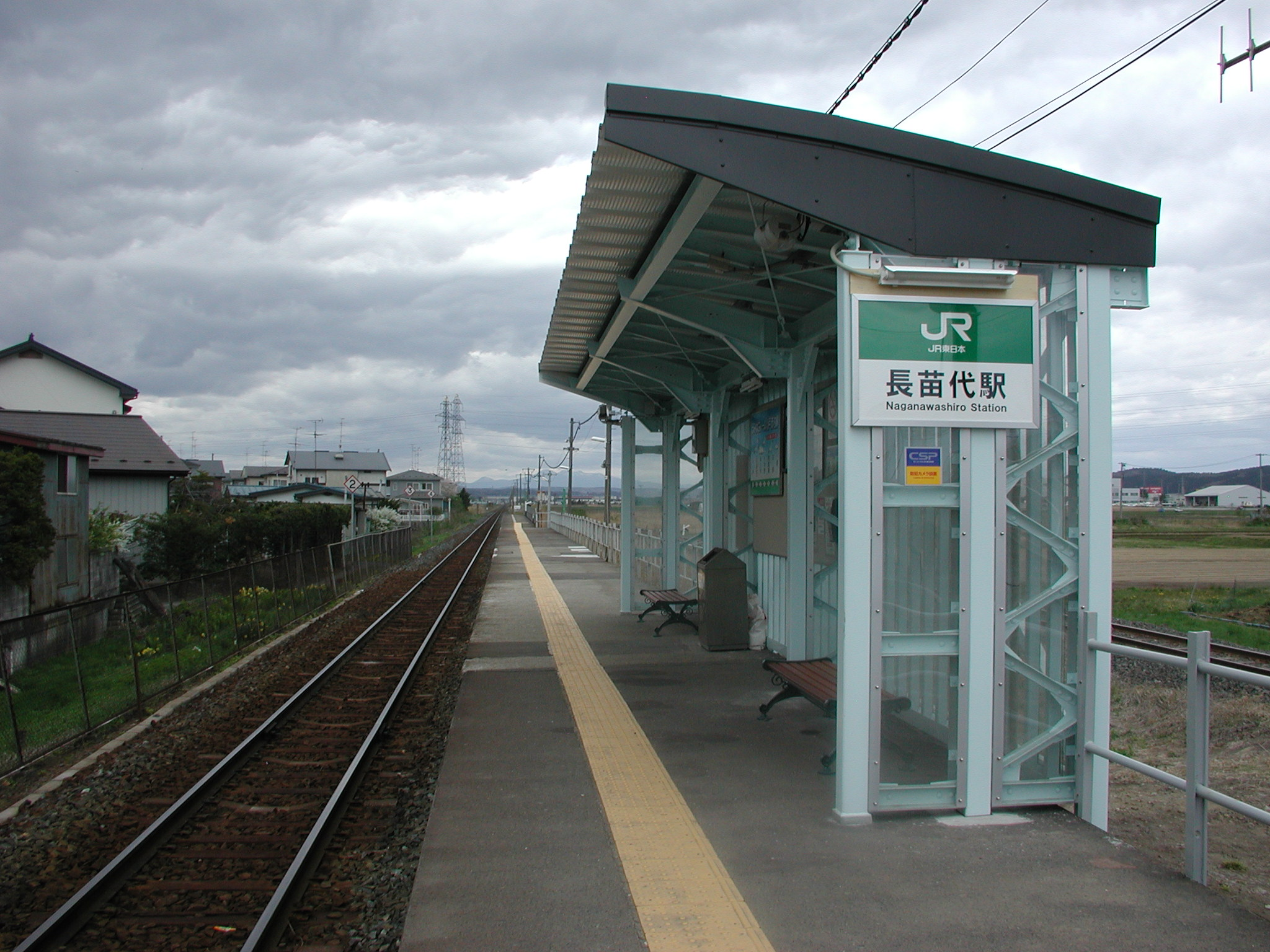 東日本旅客鉄道(JR東日本)八戸線(愛称「うみねこレール八戸市内線」区間内)：長苗代駅